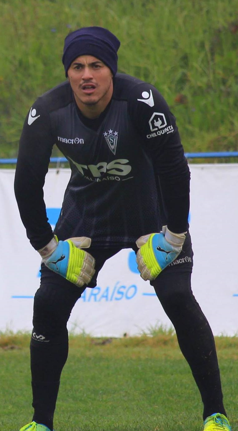 Fotografía de Nery Veloso, futbolista profesional.